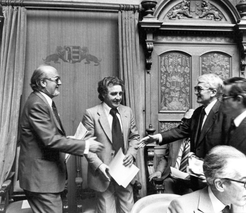 (von links) Roger Schaffter (* 11. Dezember 1917 in Basel; † 13. Februar 1998 in Delémont),Schweizer Politiker (CVP) und Pierre Gassmann (* 16. Dezember 1932 in Delémont; † 3. Mai 2011 in Saignelégier), Schweizer Politiker (SP.)